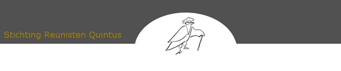 SRQ header